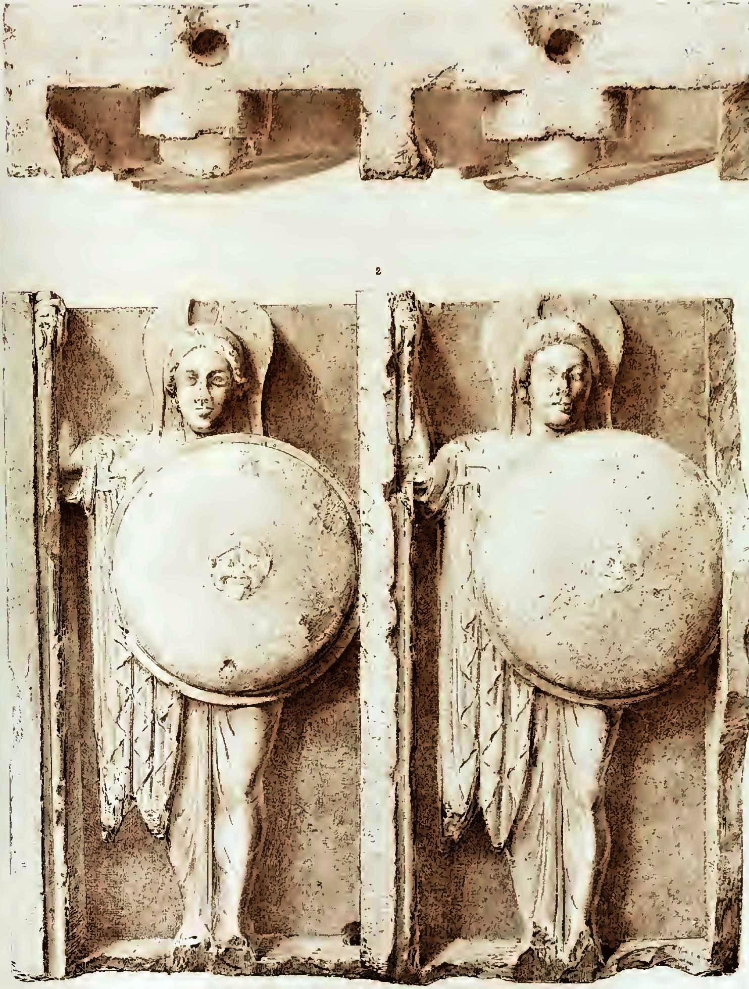 Relief mit doppelter Abbildung der Athena